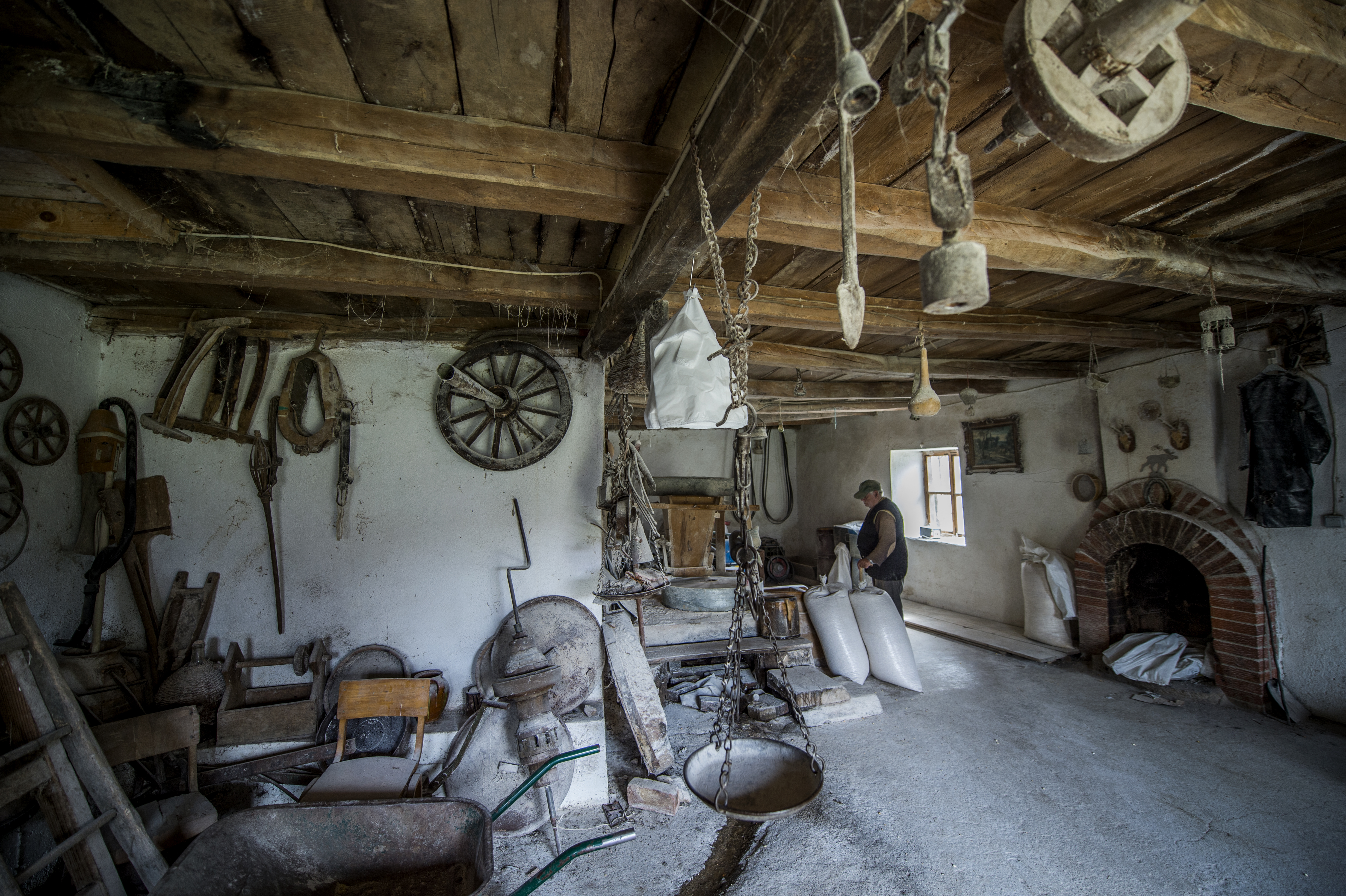 Mulliri –muze i Frrok Dokiqit